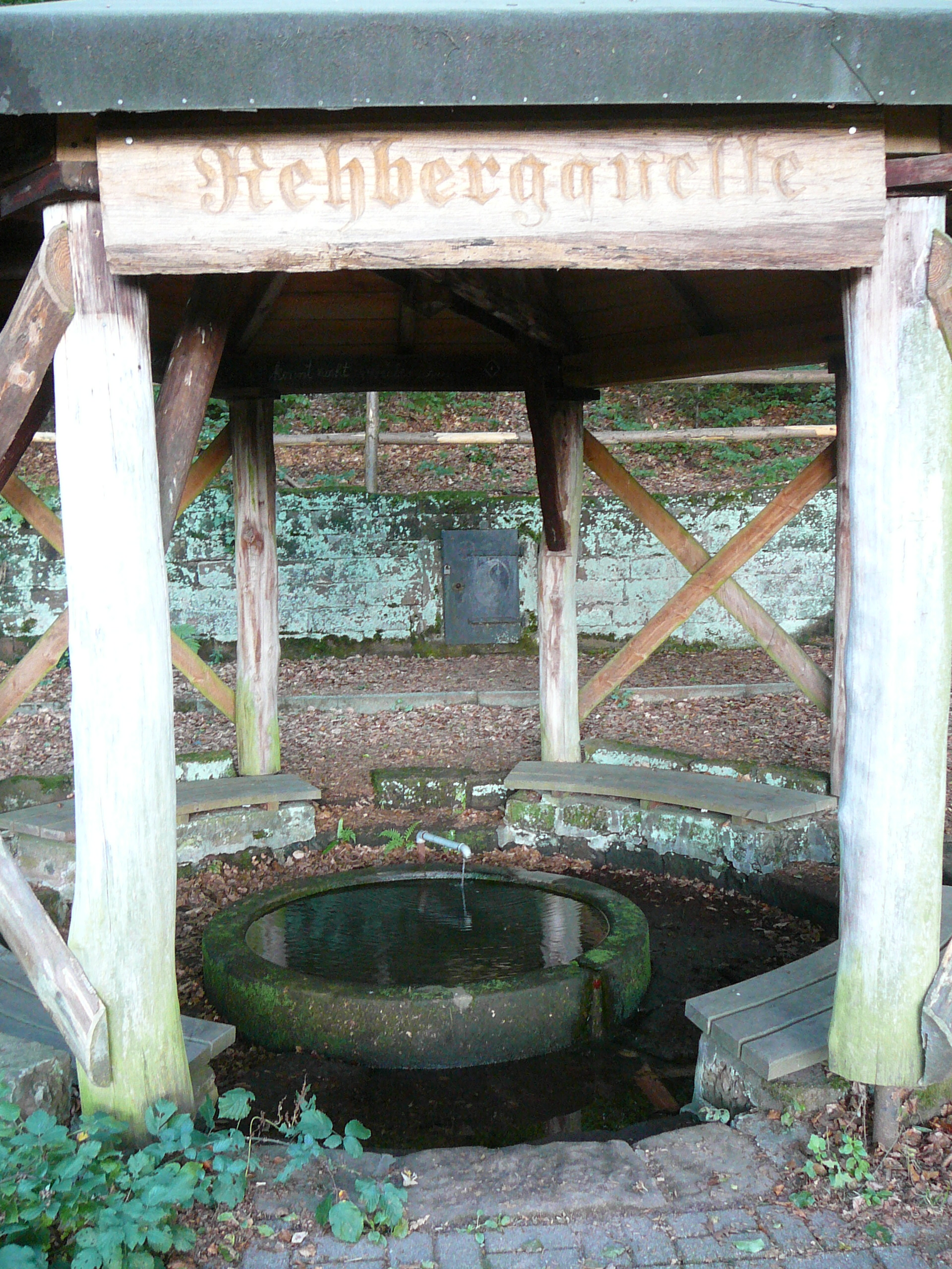 Die Rehbergquelle unterhalb des Rehberggipfels